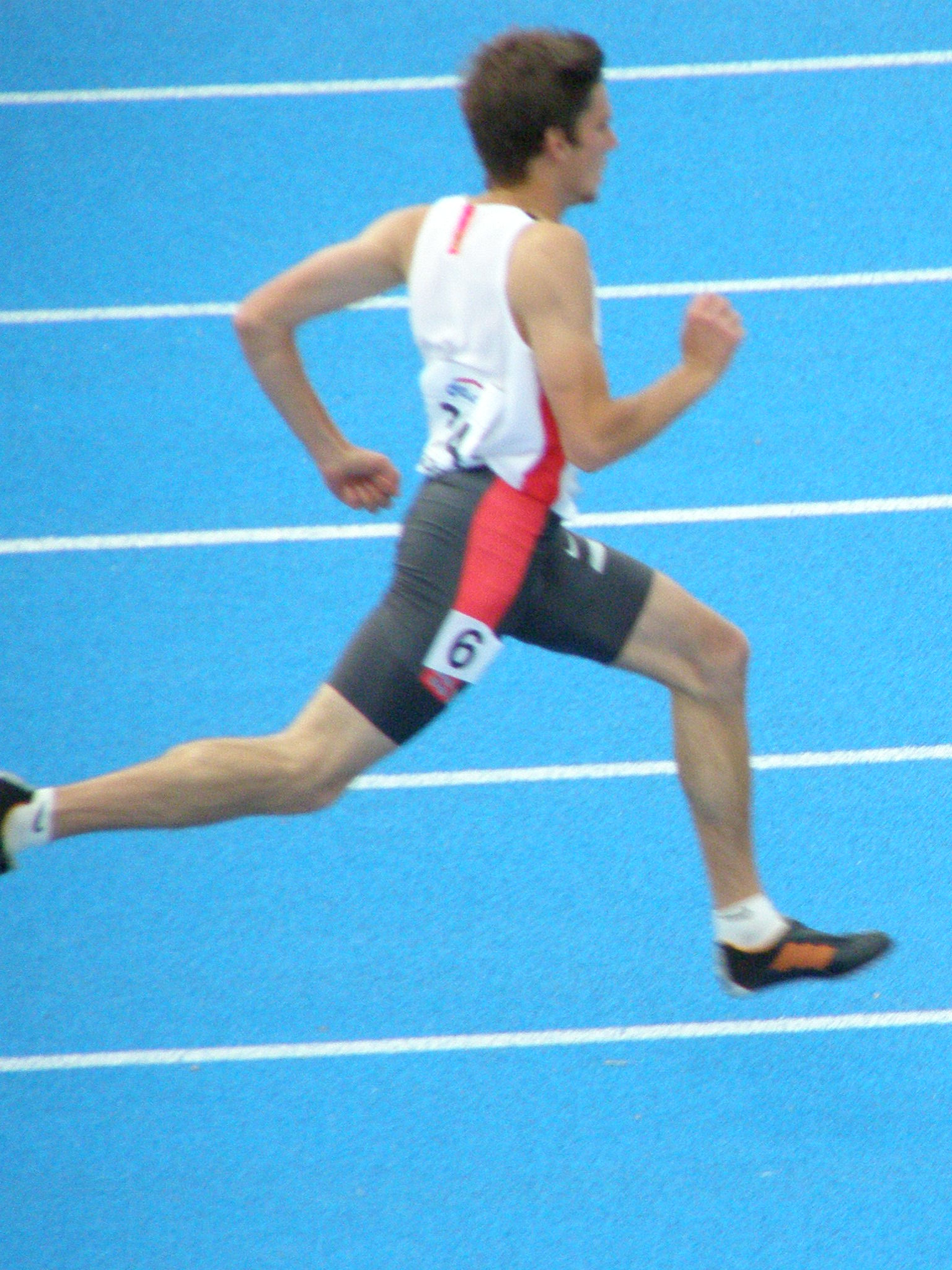 Mistrzostwa Świata Juniorów w Lekkoatletyce - Bydgoszcz 2008 - Niklas Zender